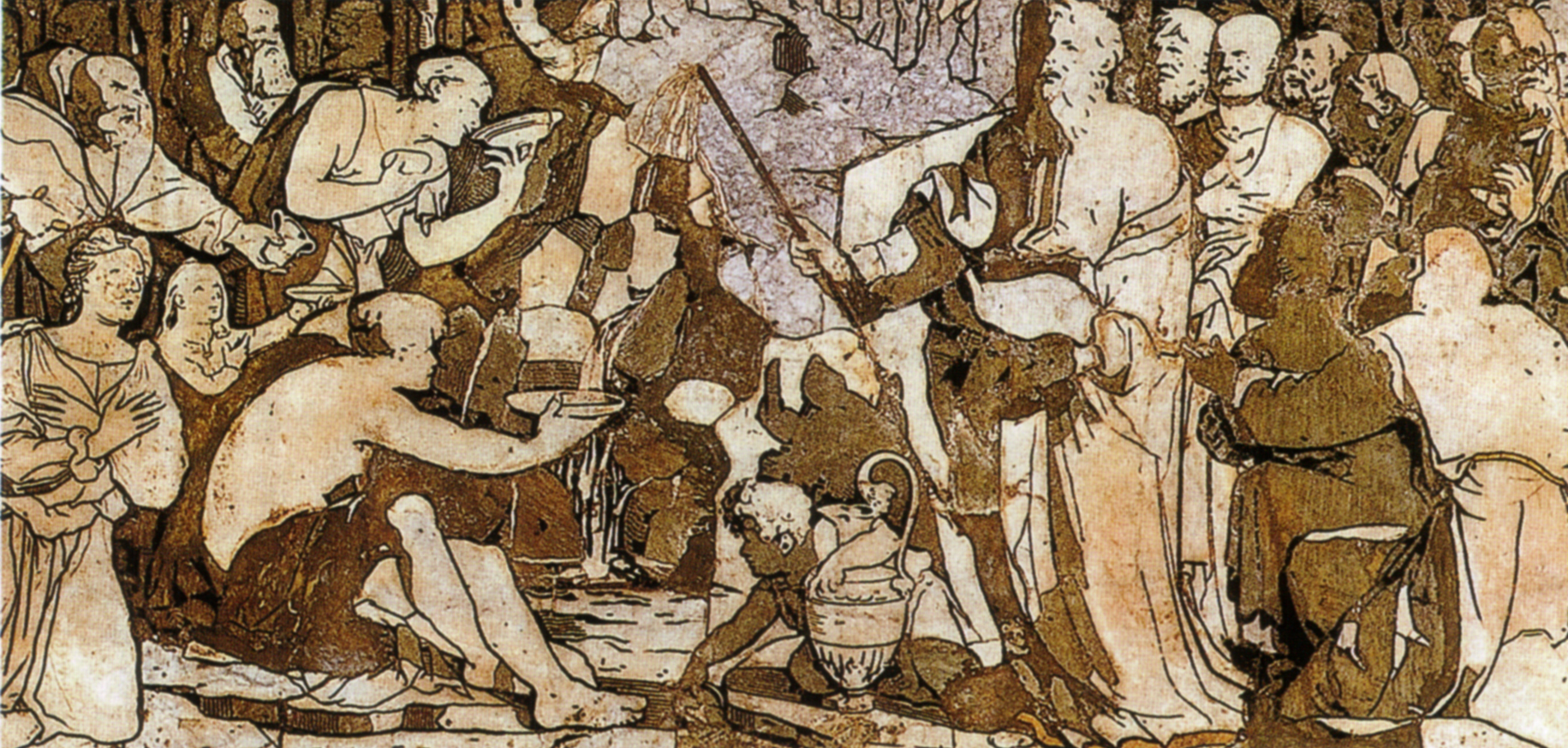 Pavimento di siena, mosè fa scatrurire l'acqua dalla rupe di horeb